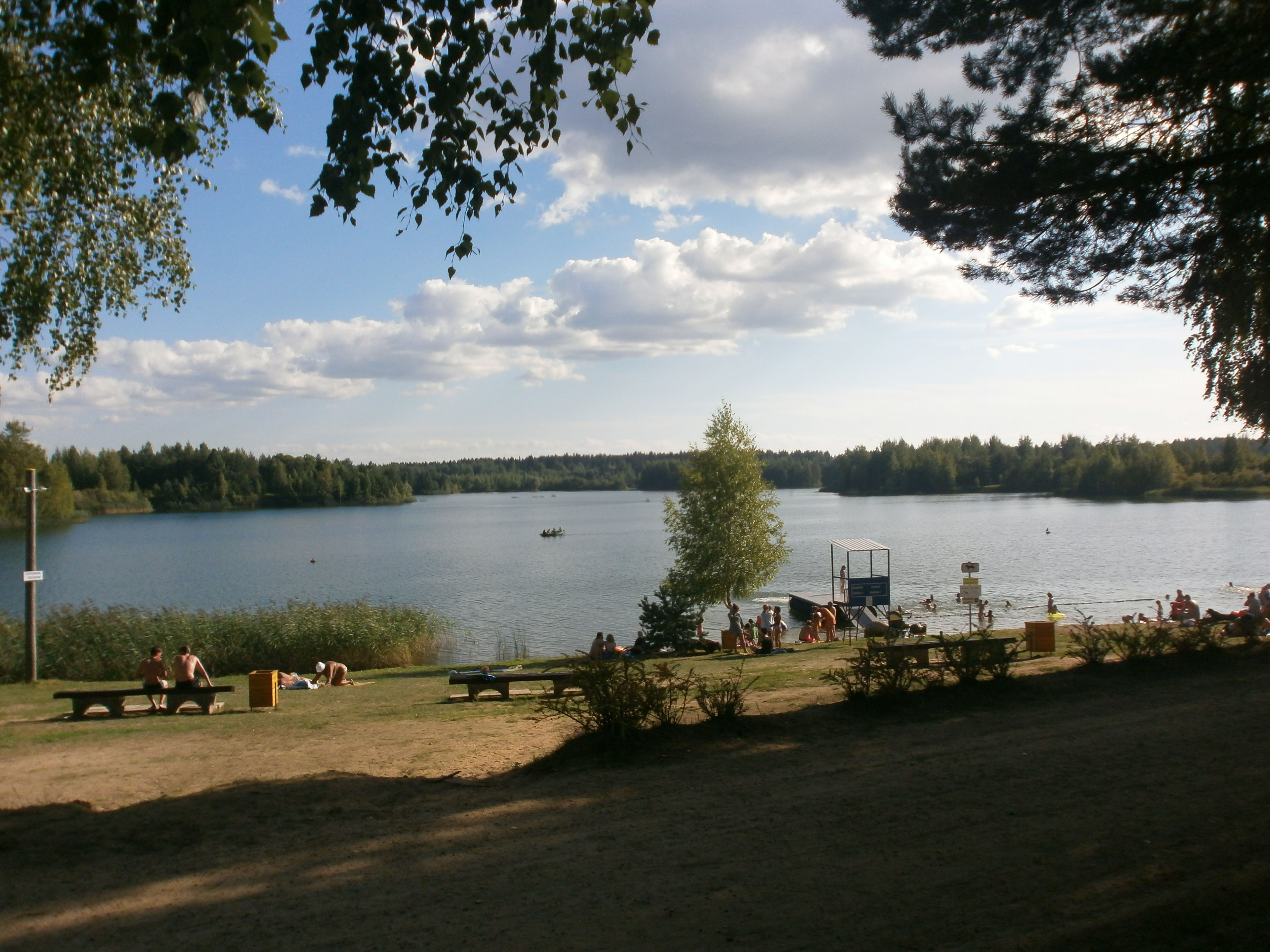 Radžu ūdenskrātuves pludmale